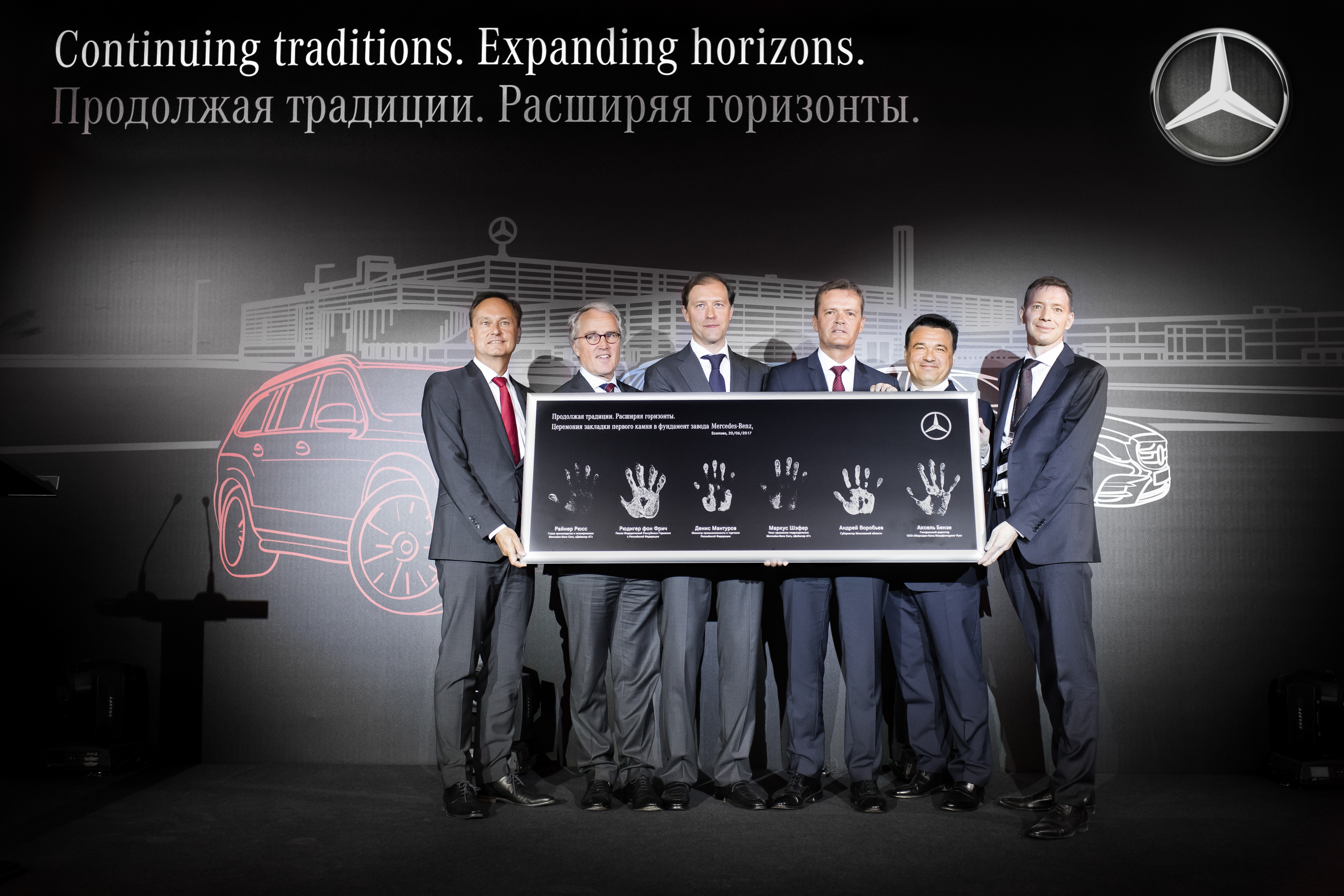 Церемония закладки первого камня в фундамент завода